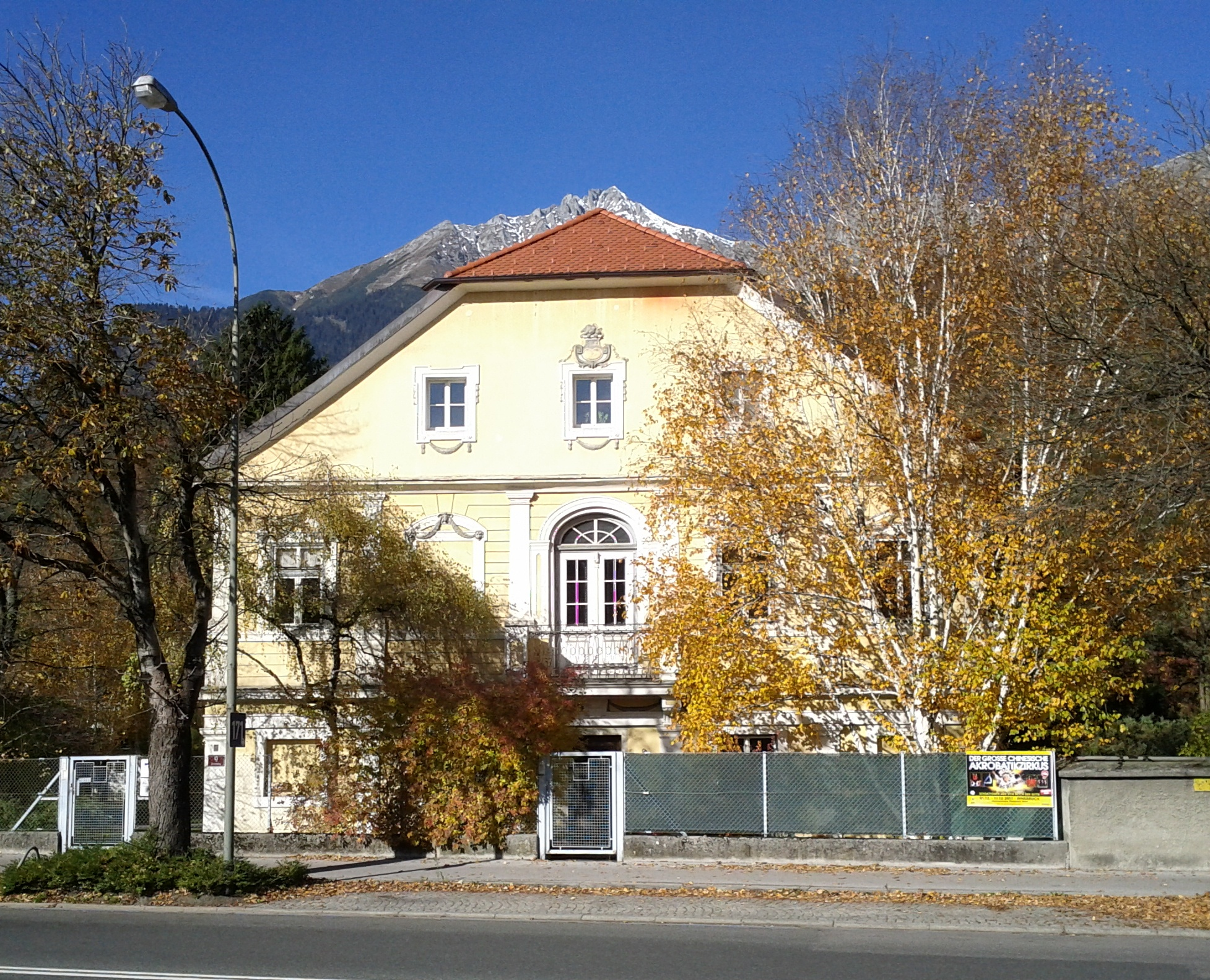 Ansitz Löwenhaus, ehem. "Böhmisches Lusthaus": Rennweg 9 in Innsbruck